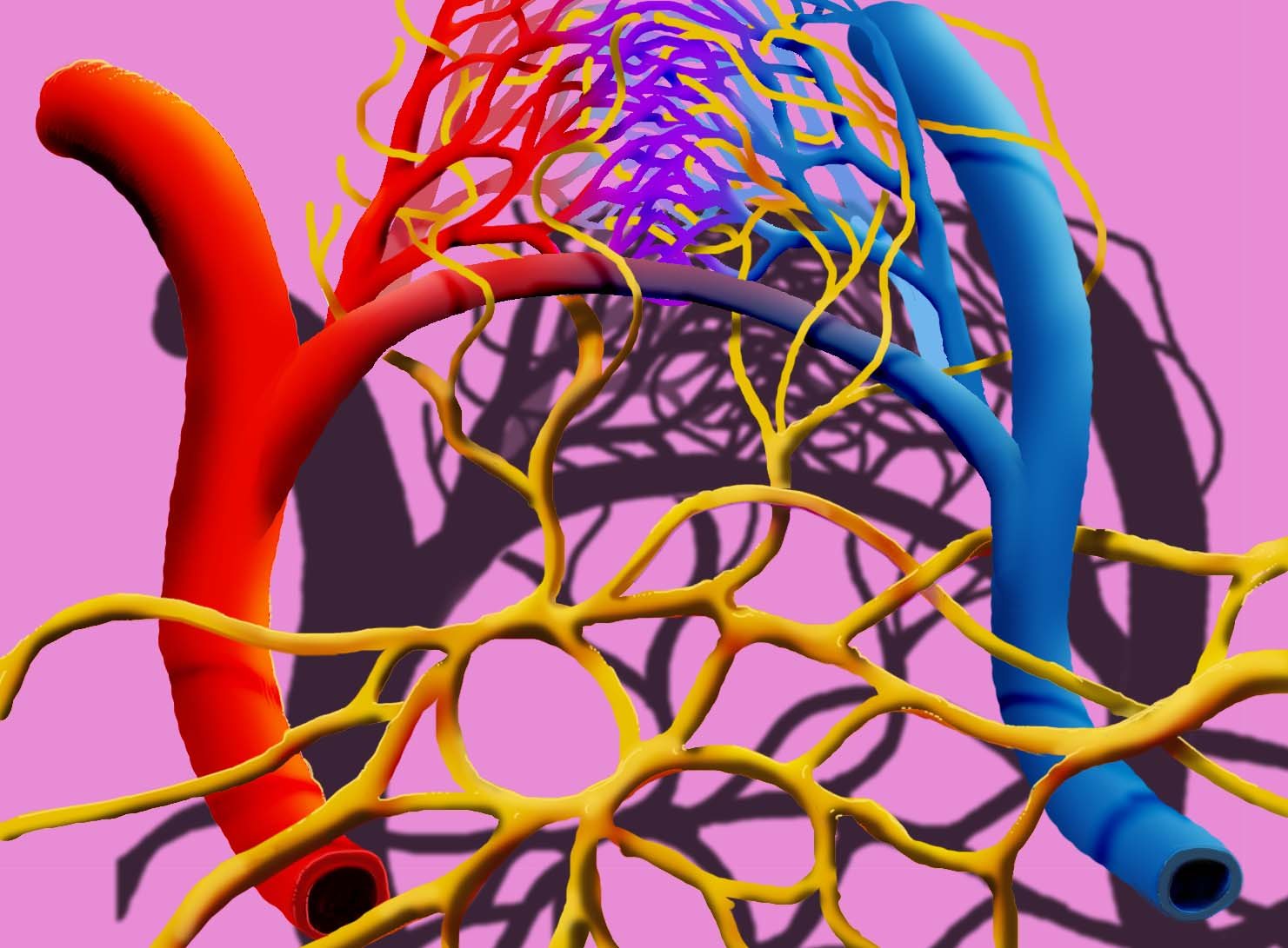 Représentation schématique des relations(au niveau des poumons) entre système lymphatique (jaune), et réseau sanguin, artériel en rouge et veineux en bleu)